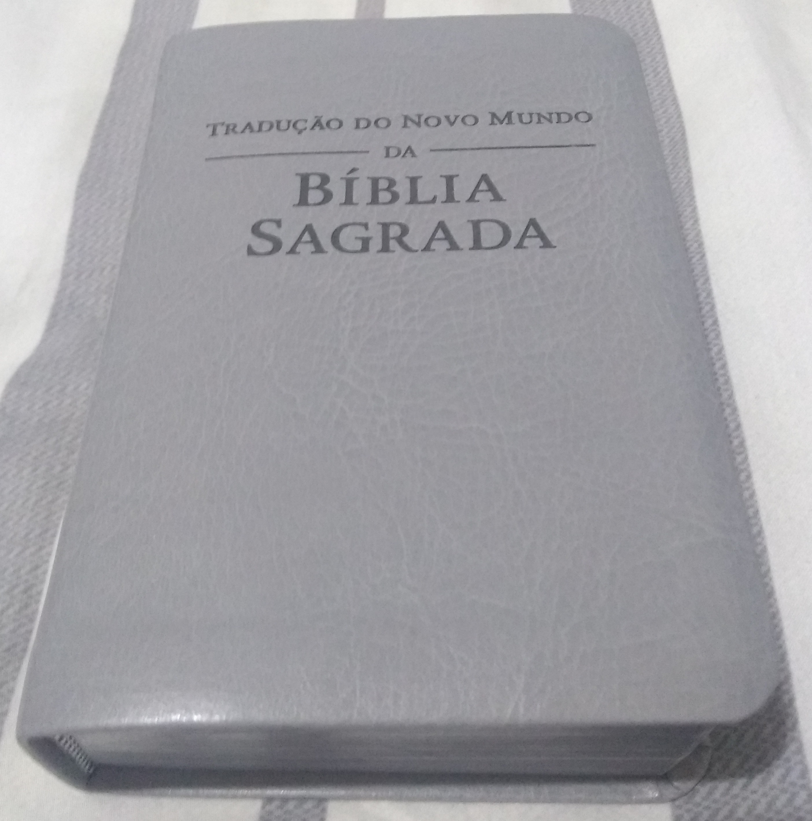 Tradução do Novo Mundo da Bíblia